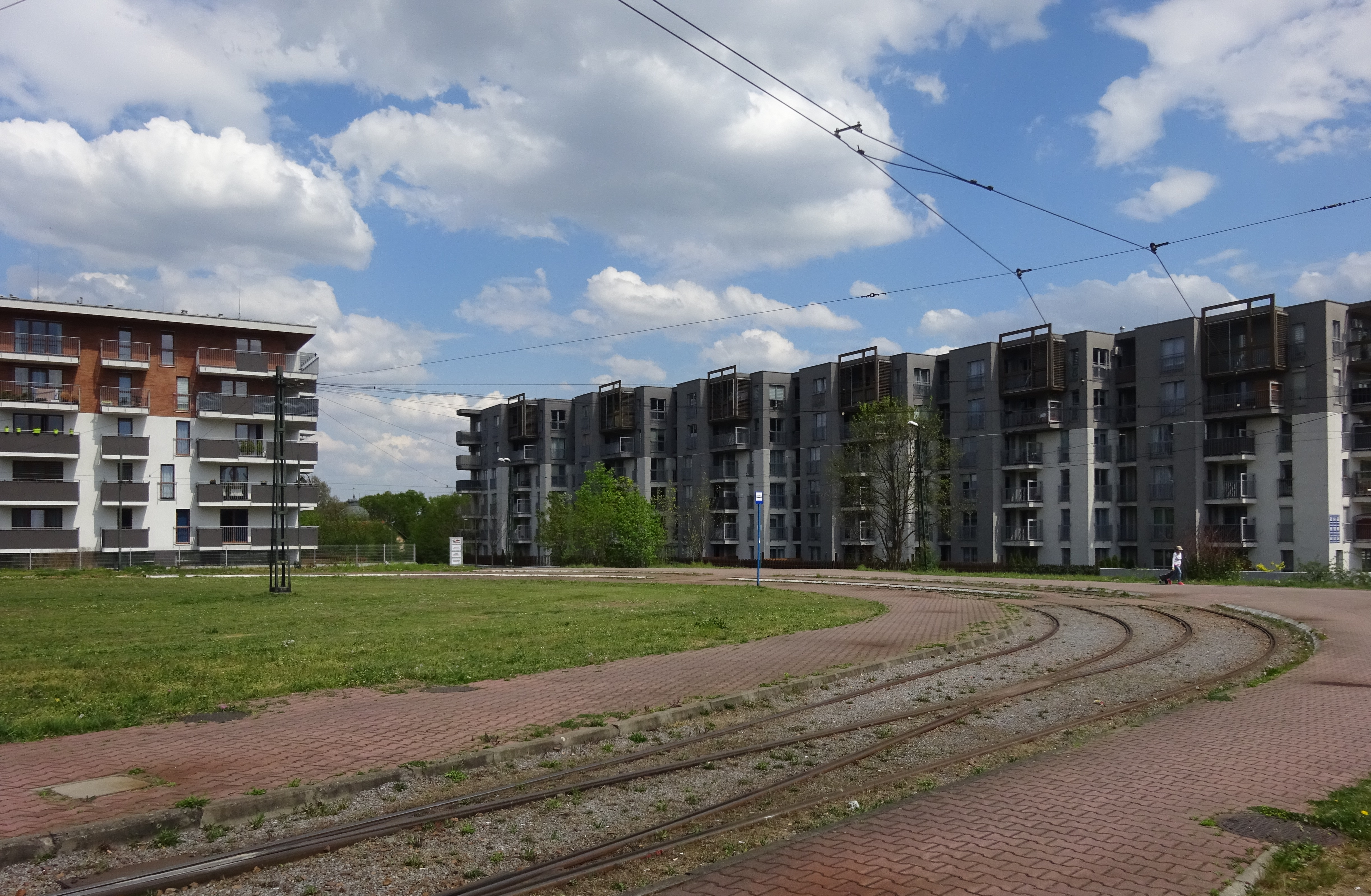 Pętla tramwajowa „Prokocim” w Krakowie przy ulicy Wielickiej.